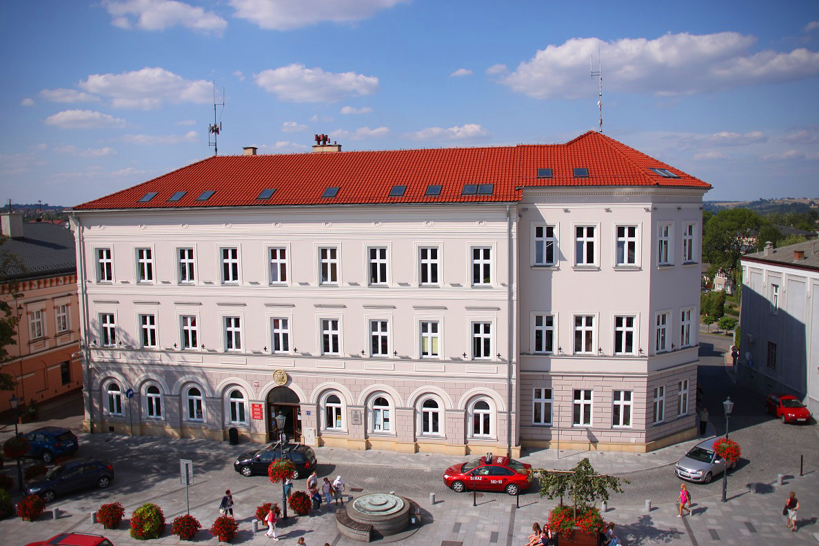 Urząd Miejski w Wadowicach